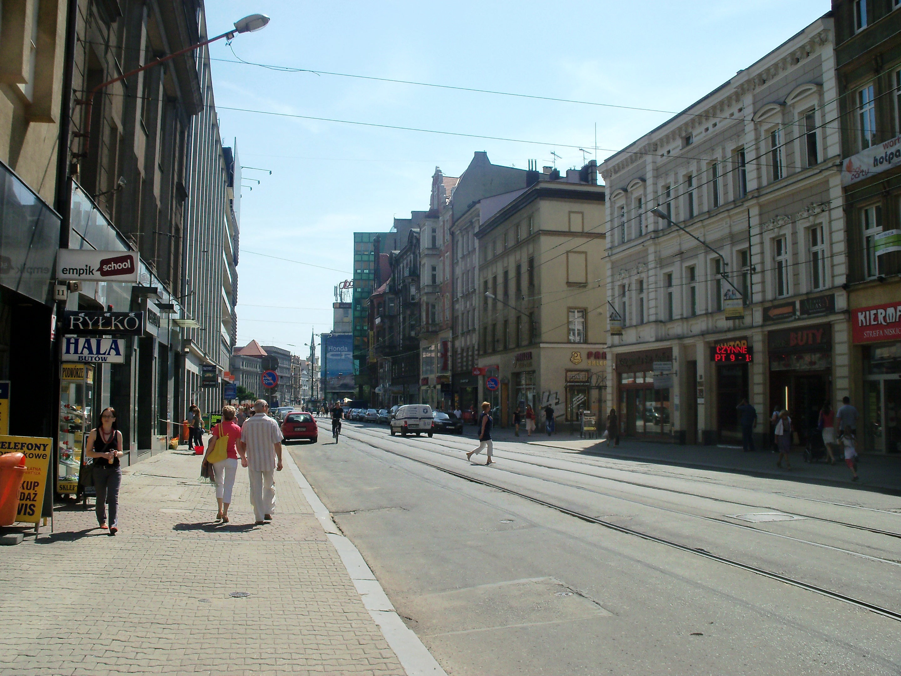 Ulica 3 Maja w Katowicach (2011 rok)